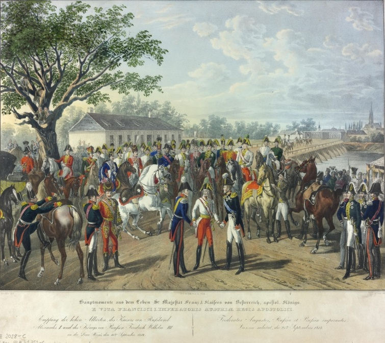 Kaiser Franz I. empfängt bei der Taborbrücke am 25. 9. 1814 Zar Alexander I. von Russland und König Friedrich Wilhelm III. von Preußen, die sich zur Teilnahme am Wiener Kongress eingefunden hatten. Lithographie von Franz Wolf nach einer Vorlage von Johann Nepomuk Hoechle, aus der Serie „Hauptmomente aus dem Leben Sr. Majestät Franz I.“